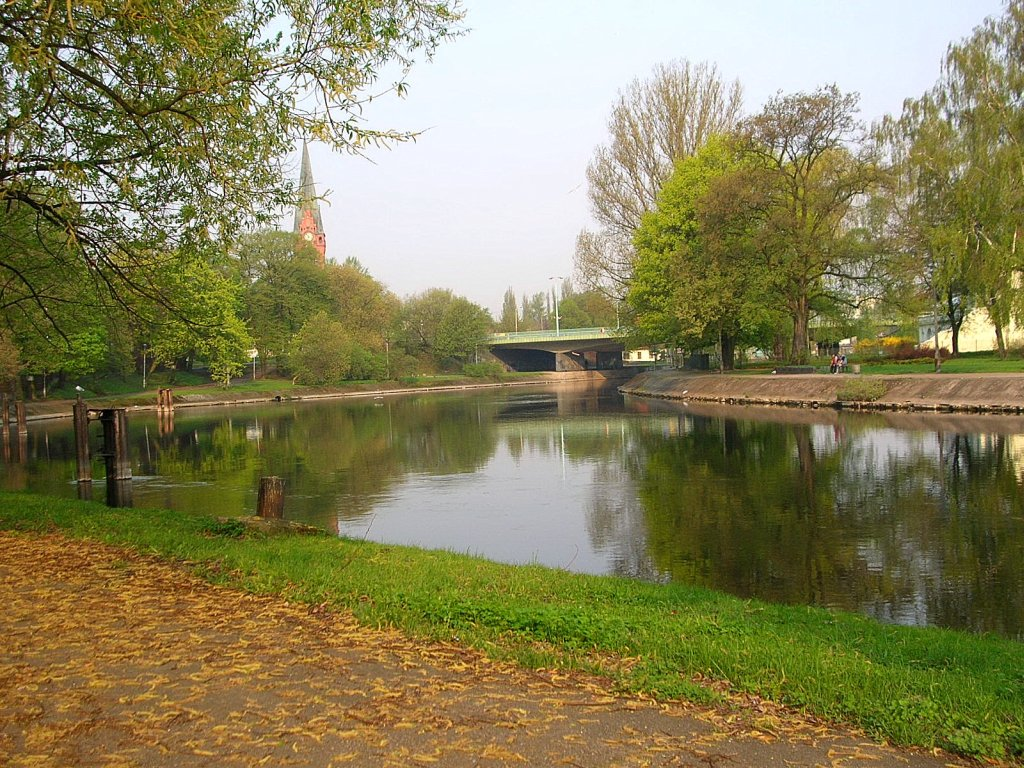 Brda w Bydgoszczy - Babia Wieś